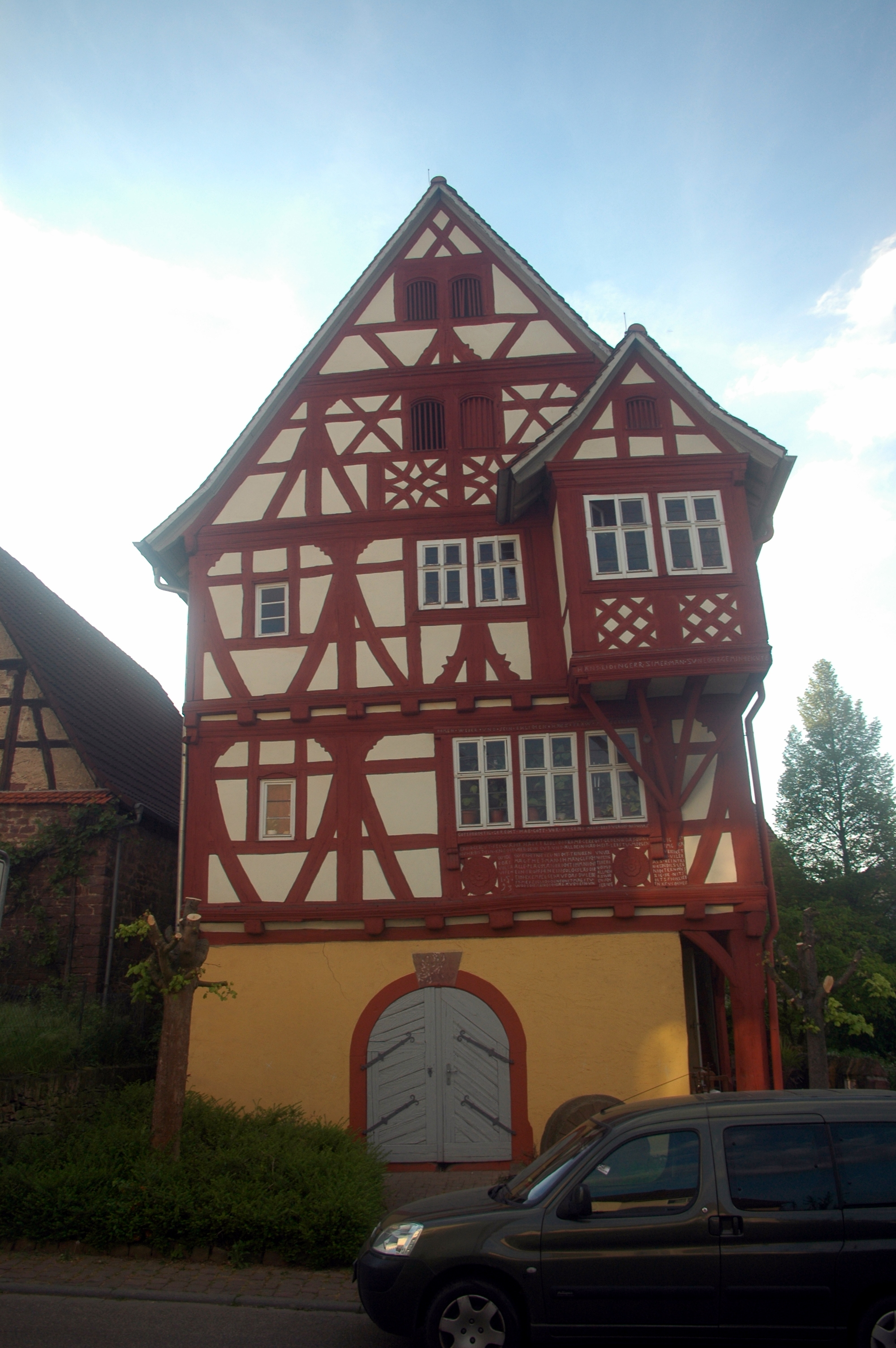 Bammental - Alte Steigstraße 4